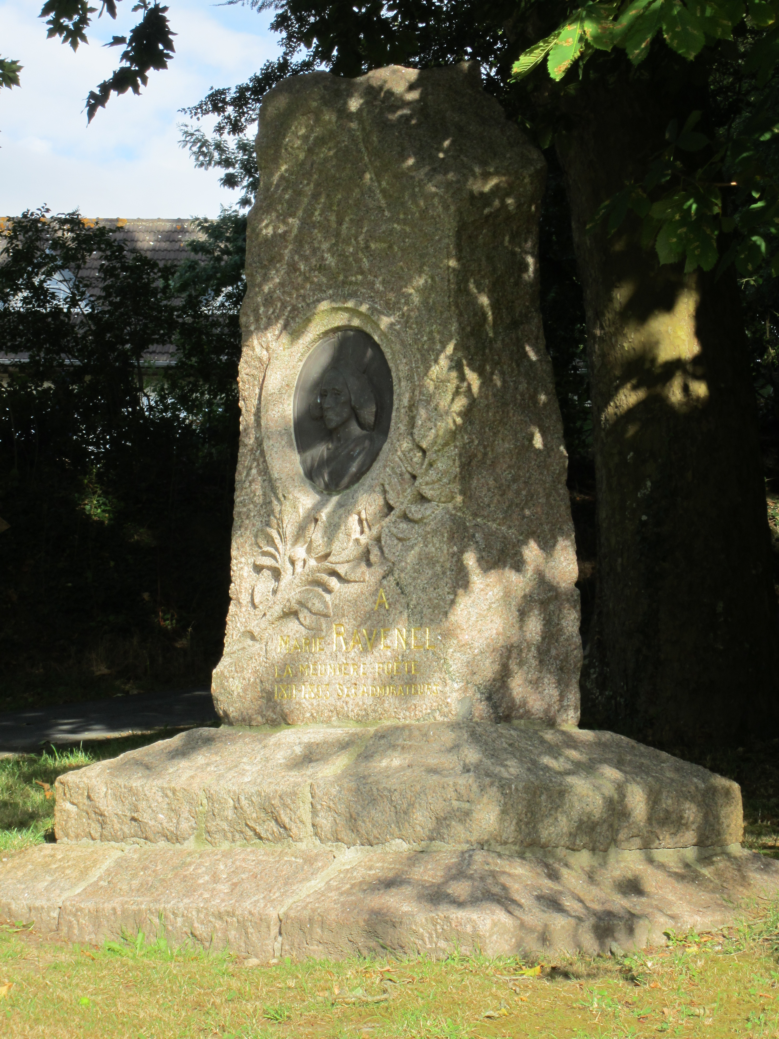 Stèle de Marie Ravenel, Fermanville .